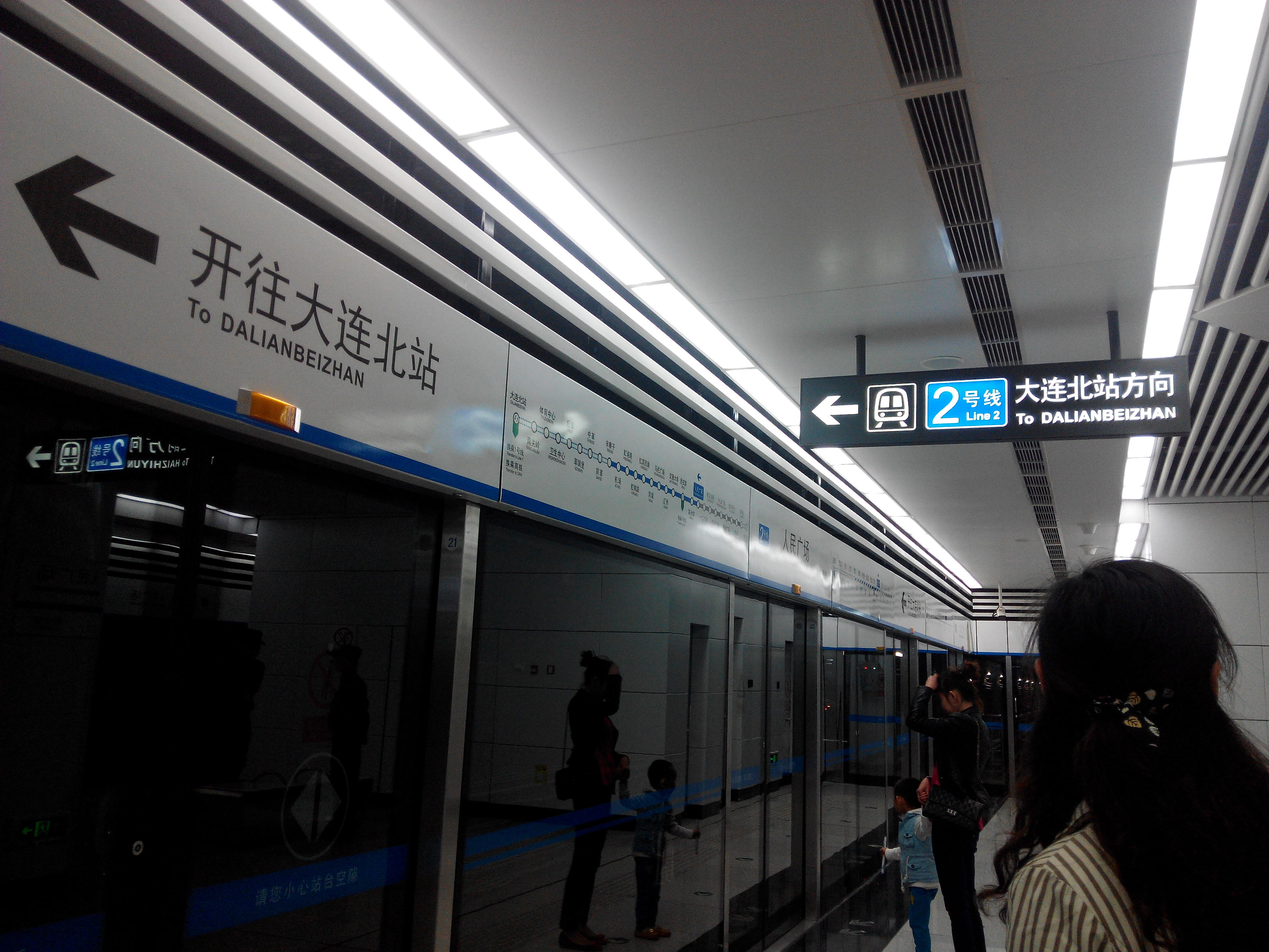 在大连地铁2号线人民广场站内，乘客正在等待开往大连北站的列车的到来。